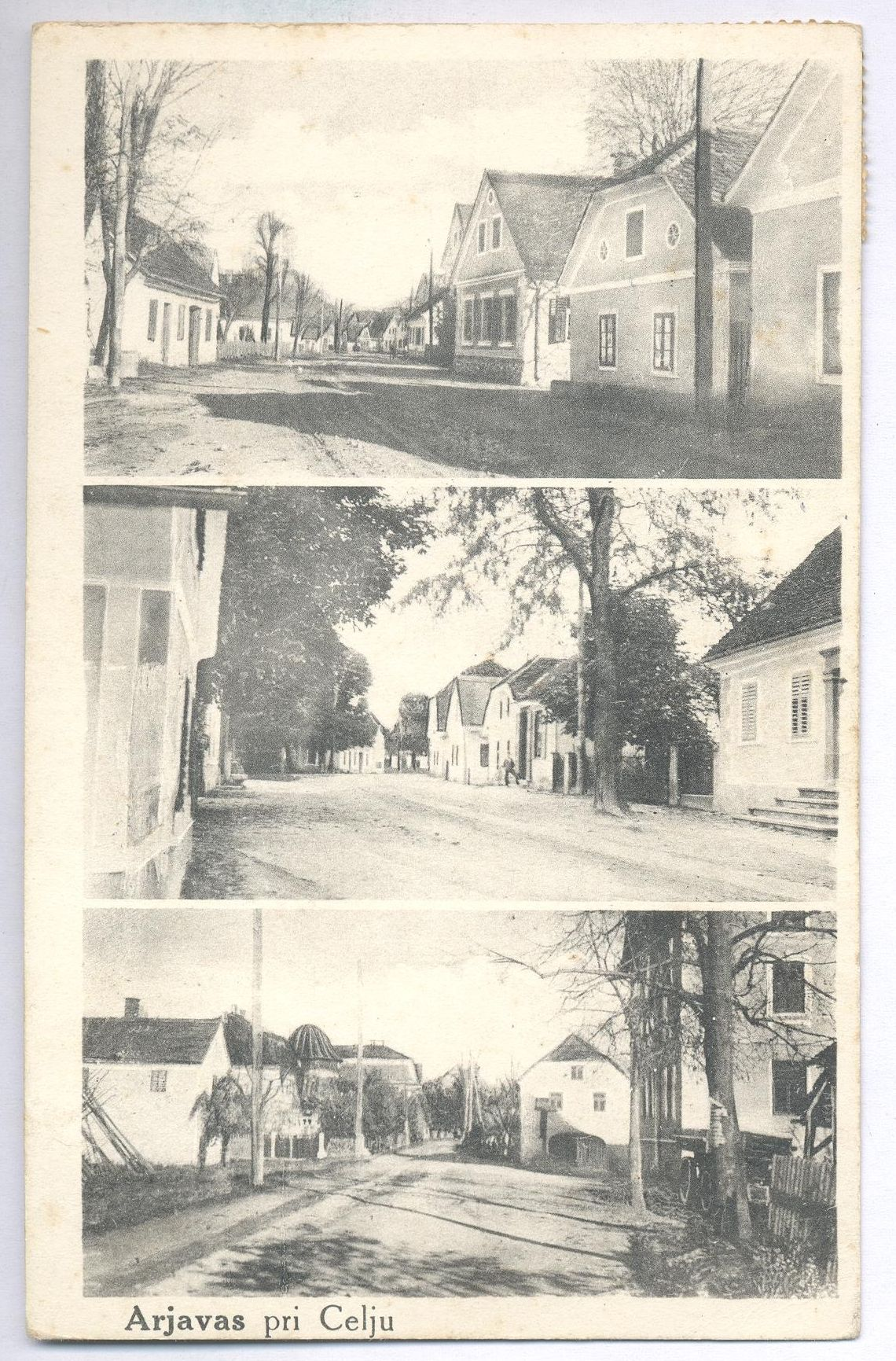 Stara razglednica Arje vasi.